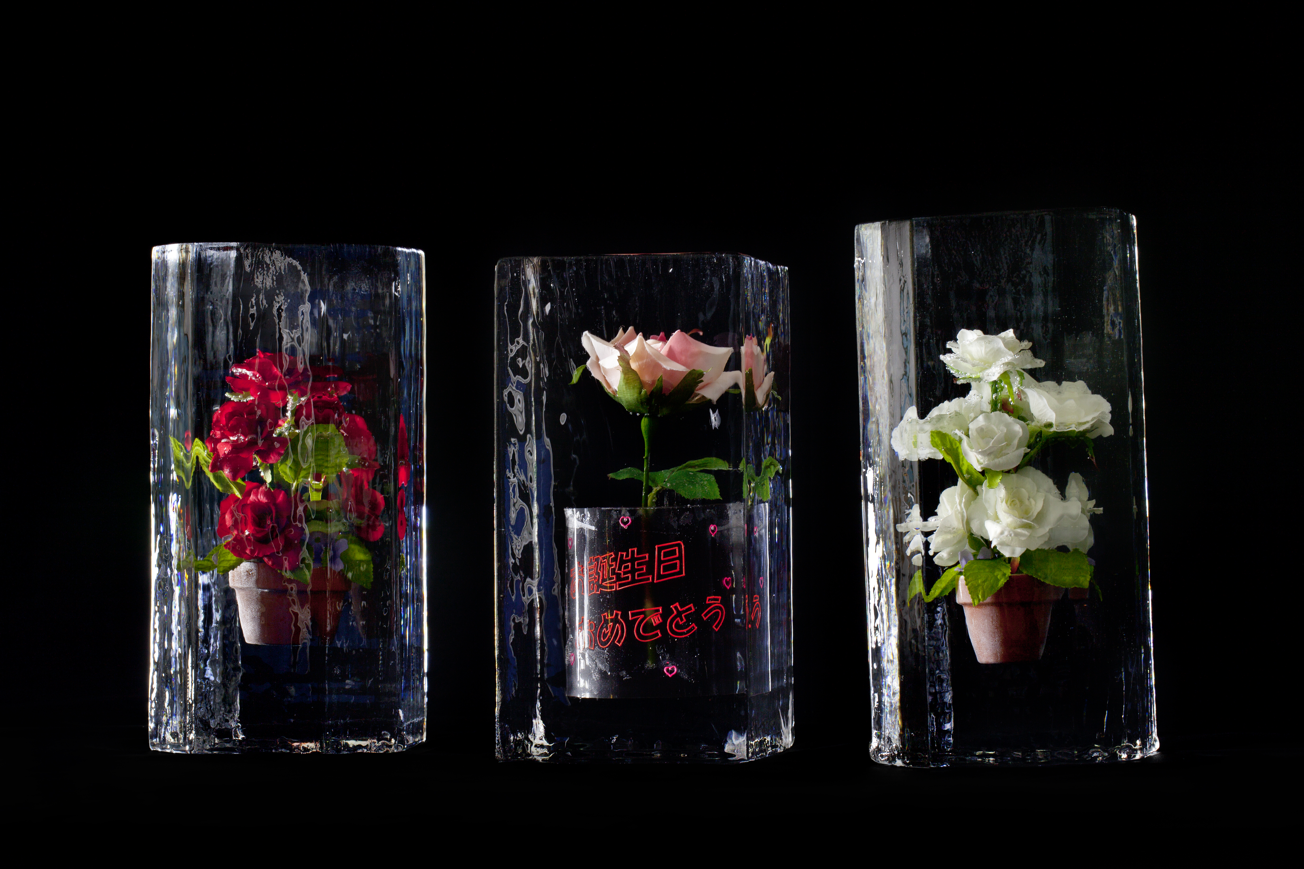 １週間以上かけてゆっくりと凍らせていく